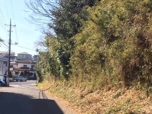 2017年1月24日